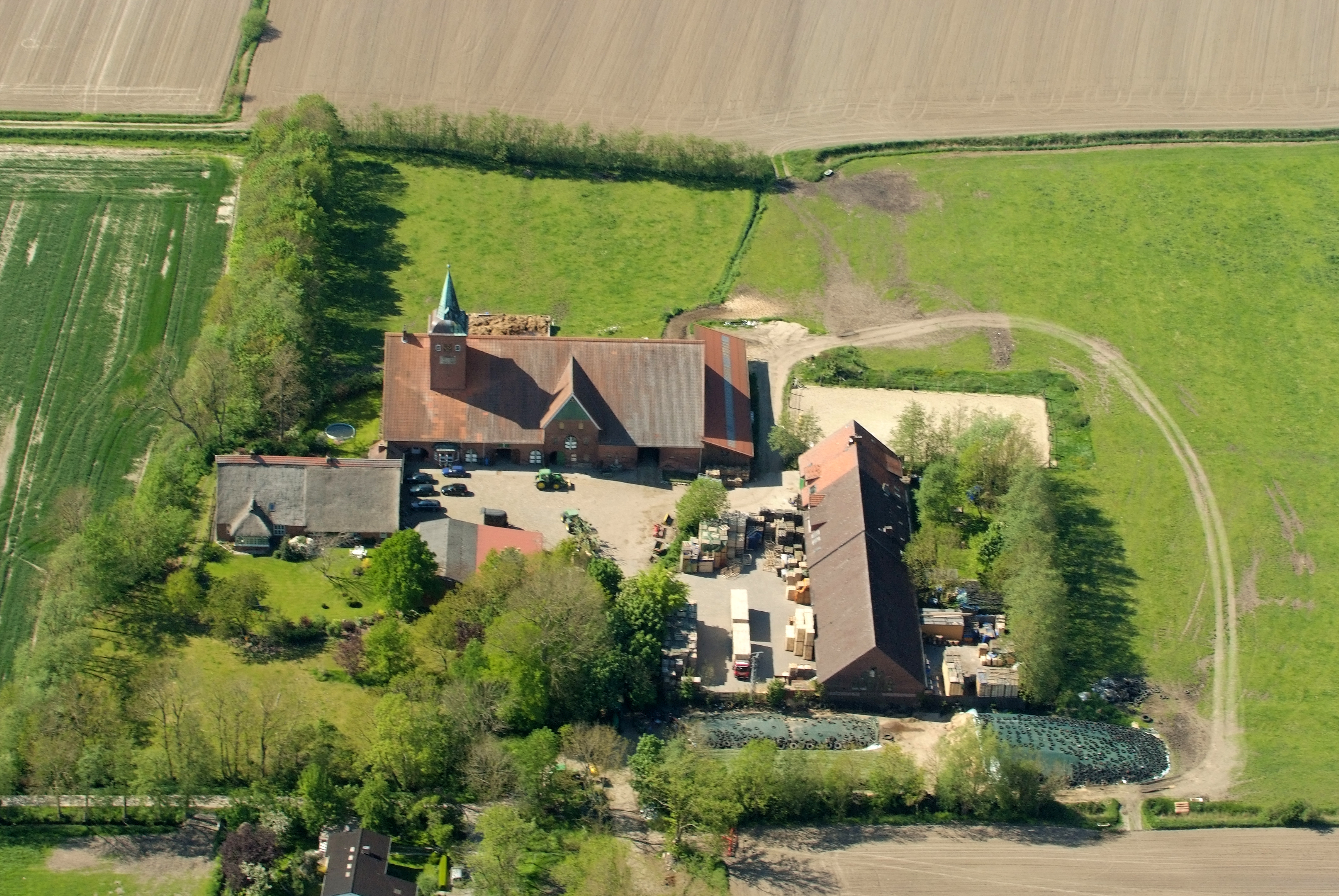 Ferienhof Rüsch, Domäne Hünkemann, Wremen Fotoflug vom Flugplatz Nordholz-Spieka über Bremerhaven, Wilhelmshaven und die Ostfriesischen Inseln bis Borkum